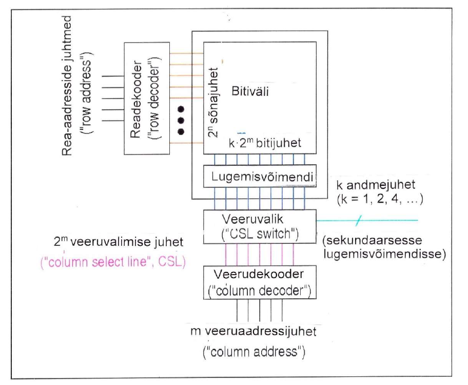 DRAM Adresskodierung.png eestikeelse tekstiga